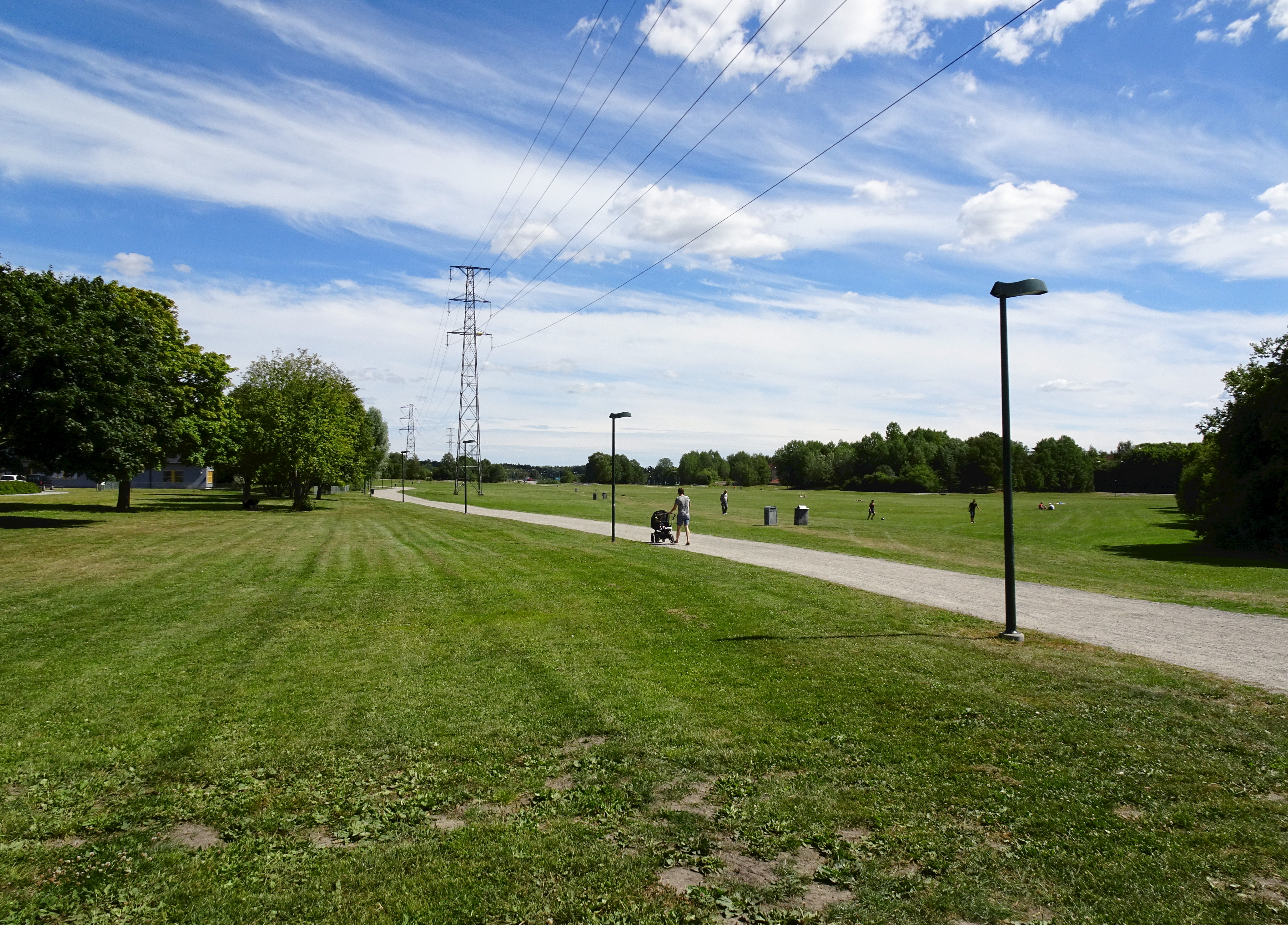 Gubbängsfältet, vy österut